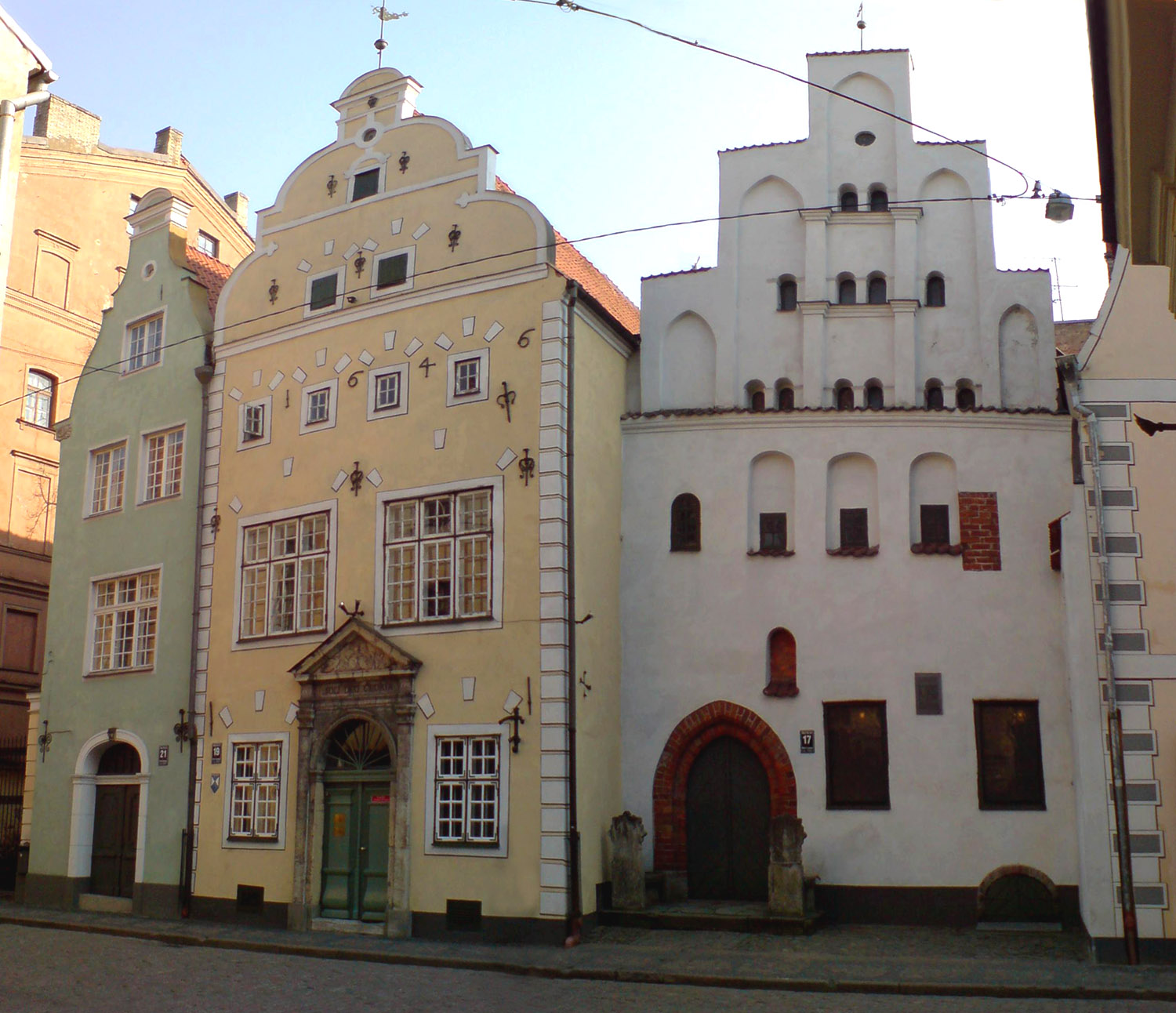 Die Drei Brüder in Riga